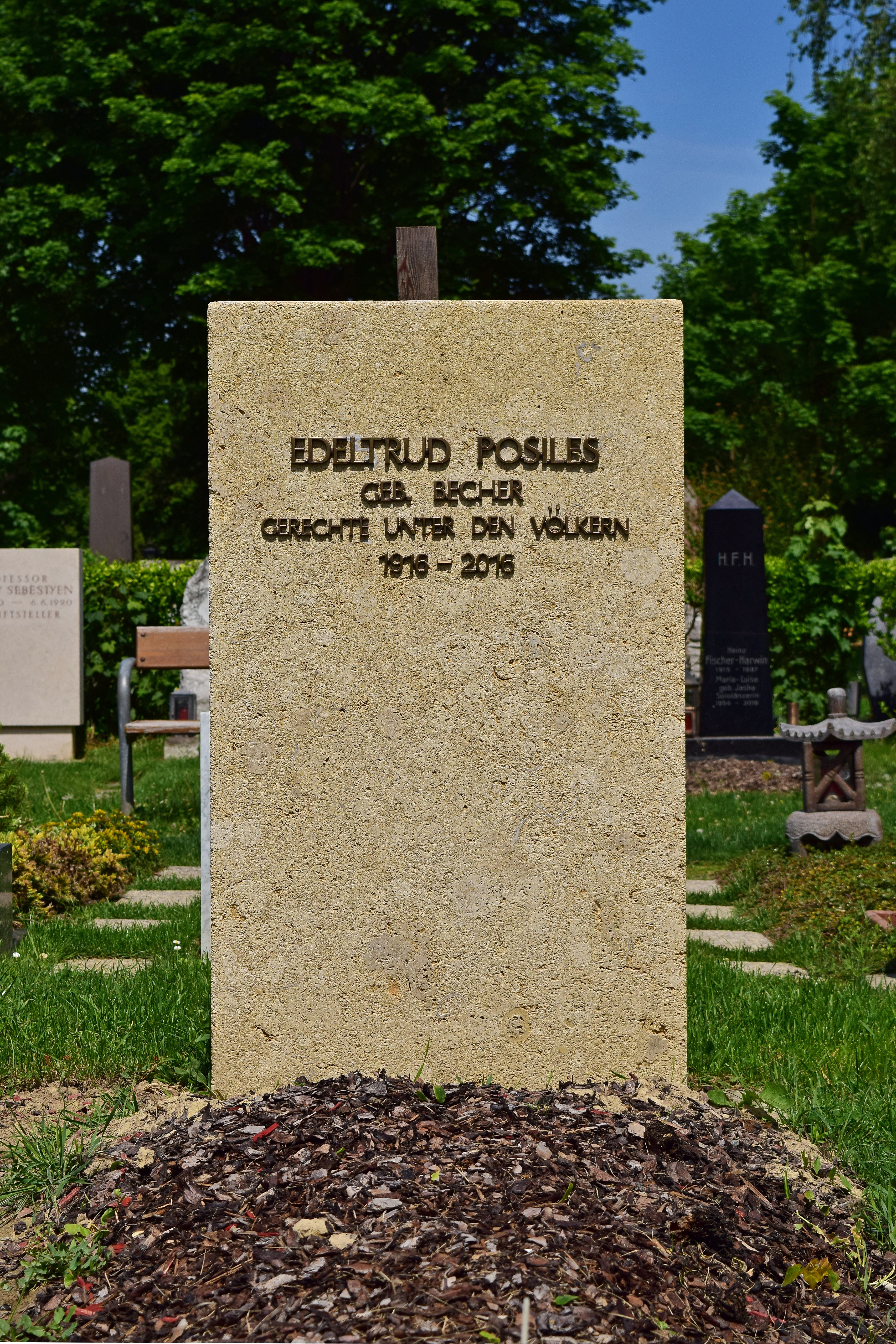 Ehrenhalber gewidmetes Grab von Edeltrud Posiles auf dem Wiener Zentralfriedhof, Gruppe 40.